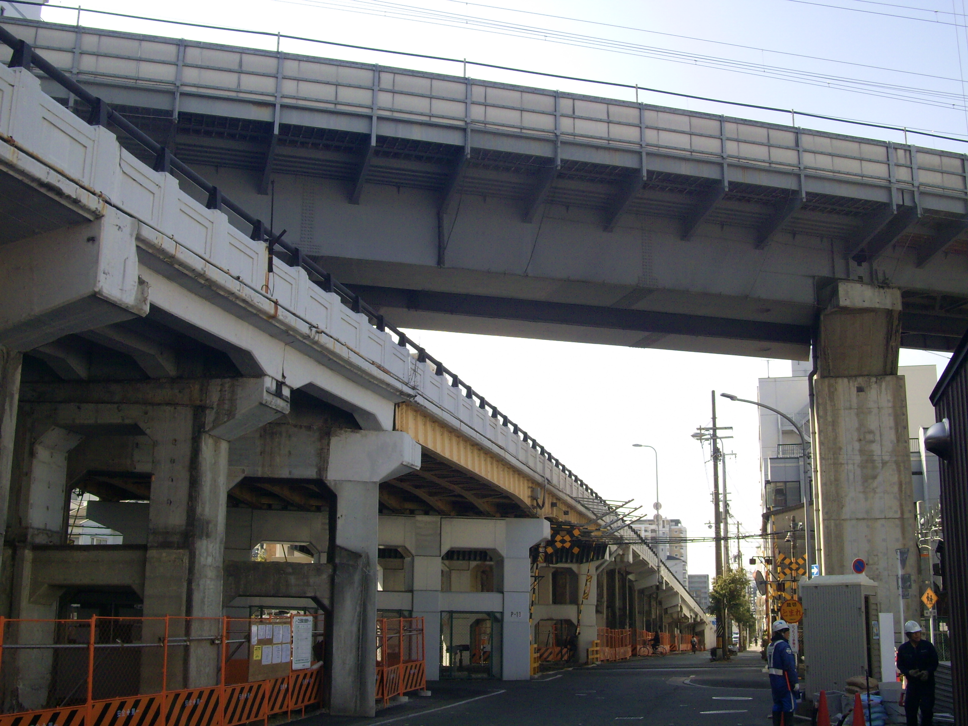 大阪府道41号大阪伊丹線を乗り越える山陽新幹線の第２三津屋架道橋。路線としてはJR西日本の山陽新幹線区間だが、管理上はこの高架橋までJR東海が担当する。 新幹線および道路の高架下には在来線の北方貨物線が通過し、踏切もある。 ㊟カメラを起動すると日付機能が出荷時のものに初期化されるため、ファイル履歴の投稿日時とメタデータの原画像データの生成日時が異なります（本概要欄の下記日付が撮影日）